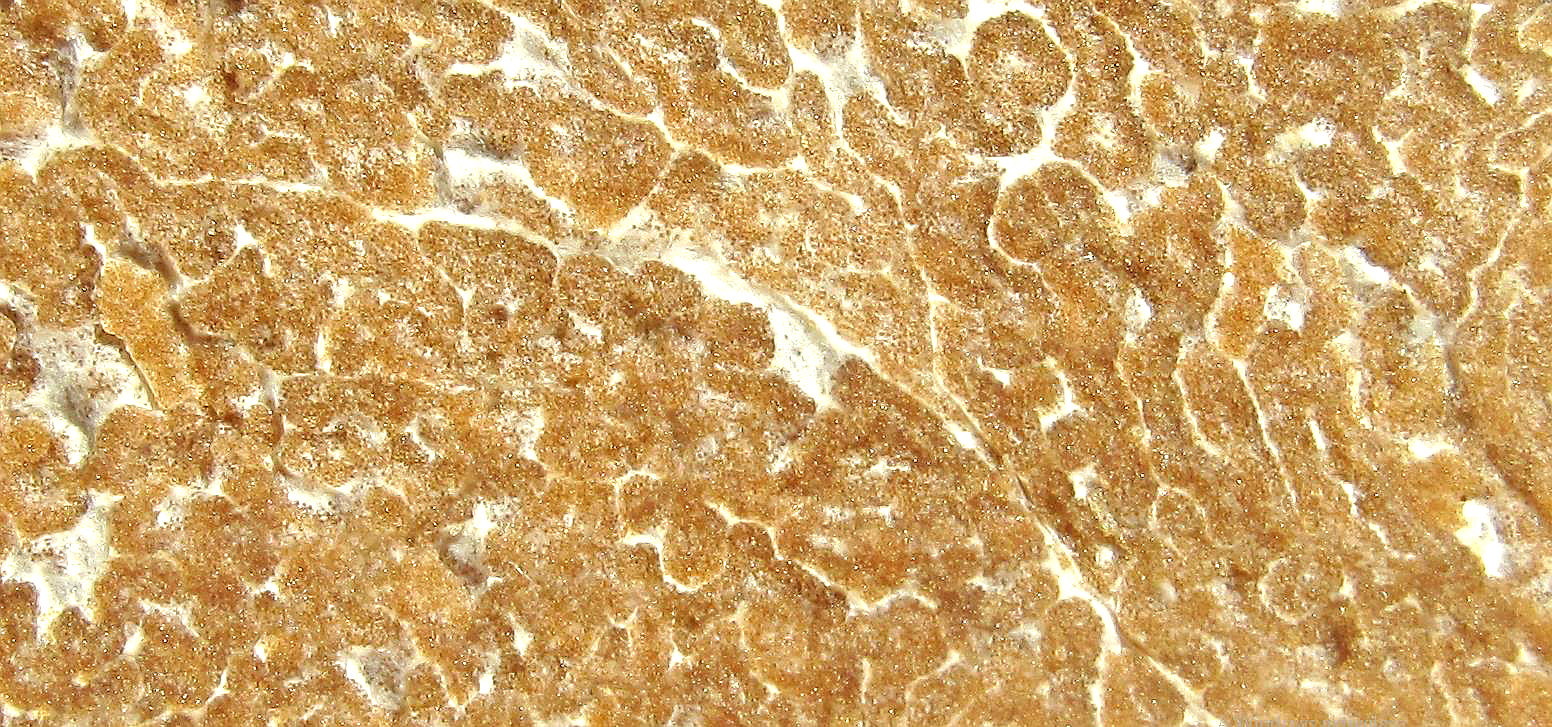 Tuber aestivum szarvasgomba húsa. A gomba belső húsa a gléba, amely a spórákat képző szerv, különlegesen erezett, márványozott mintázatú, érett korában húsos, viasznemű, tapintásra kemény, állaga a zsíros sajtra emlékezetető, illatos.